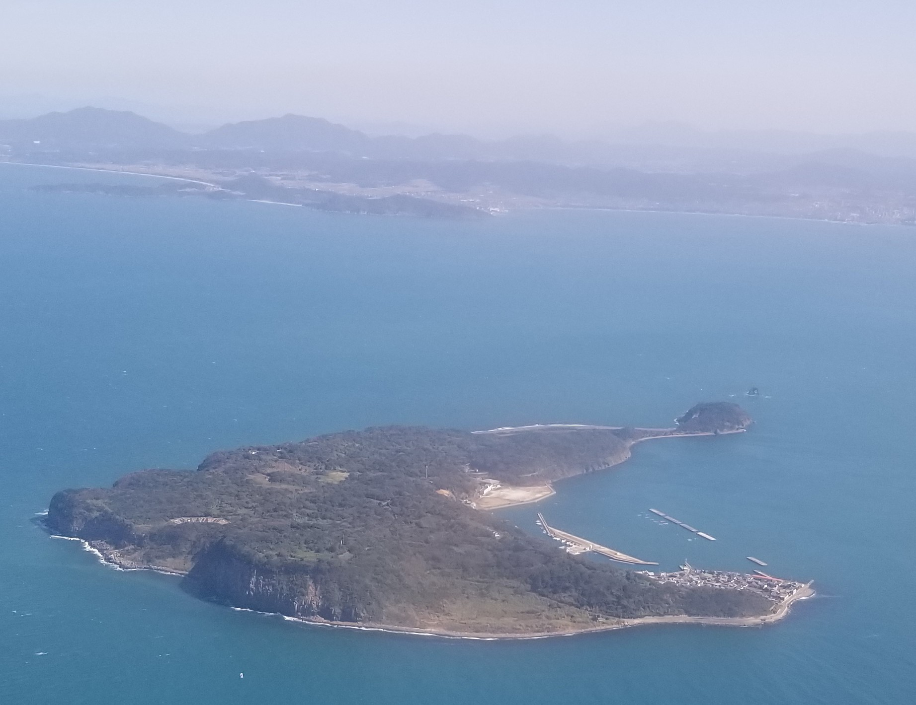 飛行機から撮影した福岡県糟屋郡新宮町にある相島（あいのしま）